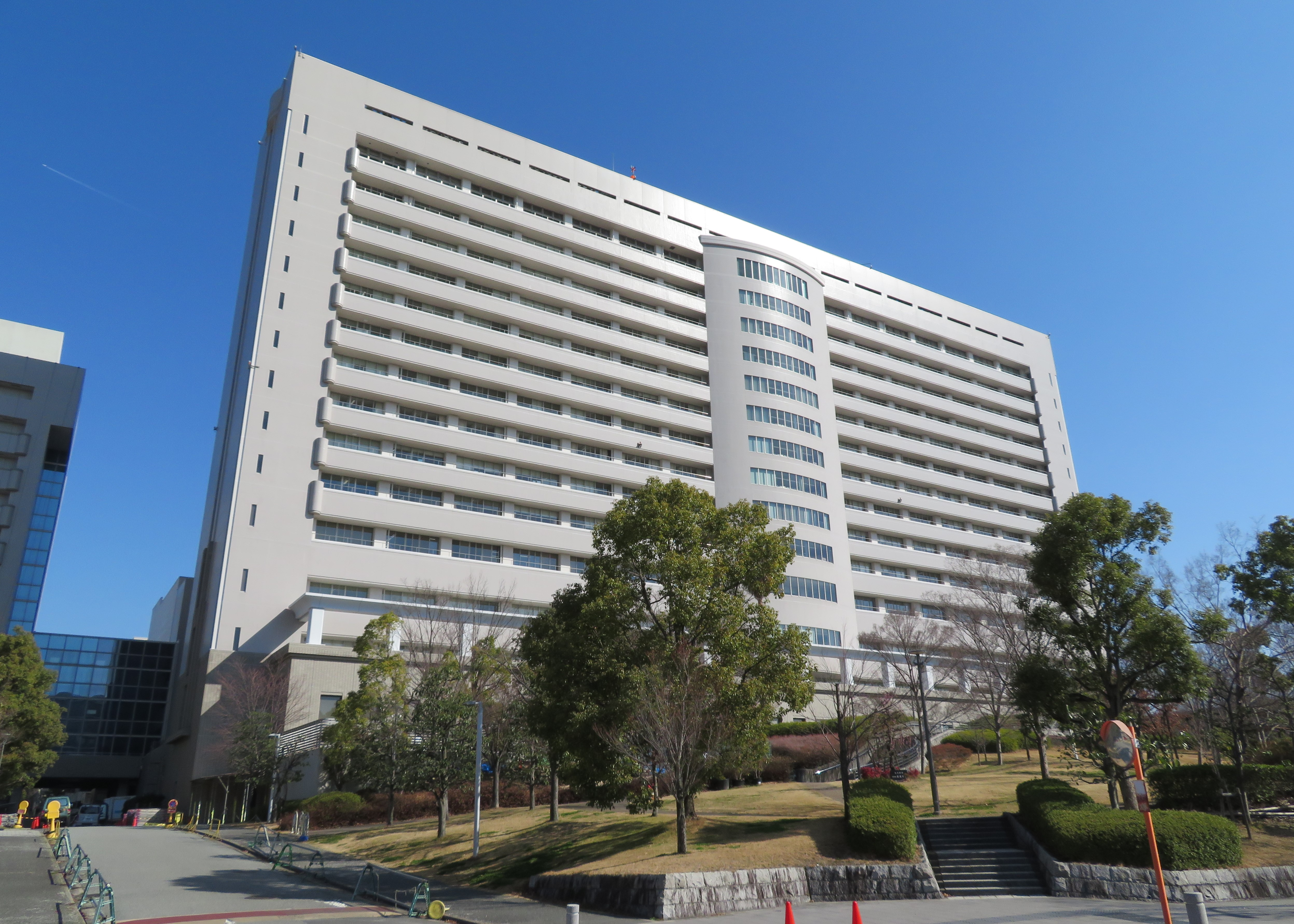 大阪大学医学部附属病院